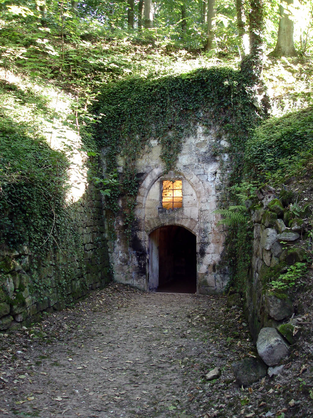 Abbaye Notre-Dame du Val, entrée du cellier, Mériel (Val-d'Oise), France.